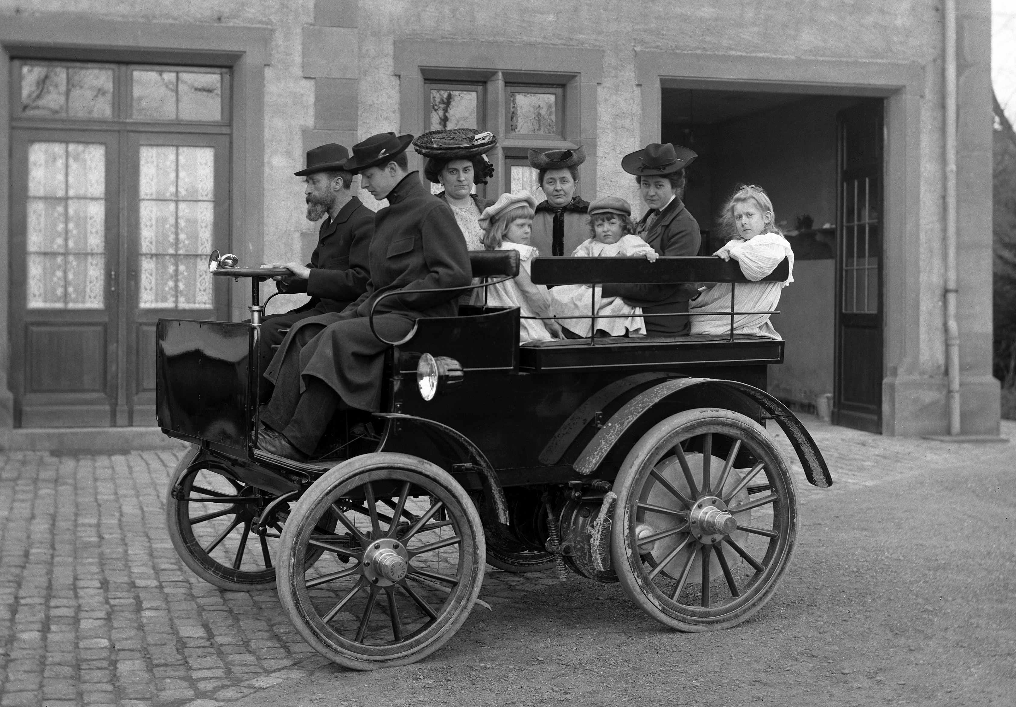 Henri Tudor am Steuer seines Break-Automobils, das um 1902 von J. Lefert in Gent hergestellt wurde und mit Tudor-Bleiakkumulatoren ausgerüstet war